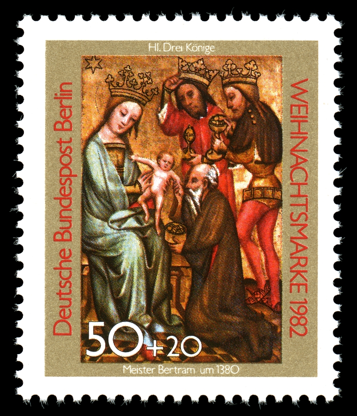 German stamp